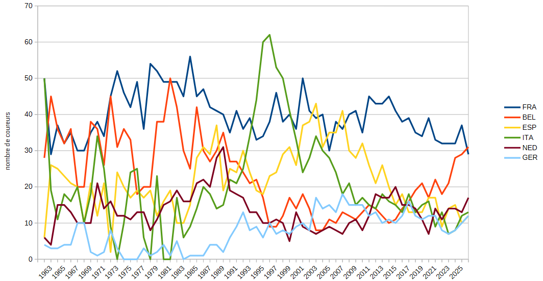 Graphique montrant le nombre de participants au tour de France par nation de 1979 à 2019